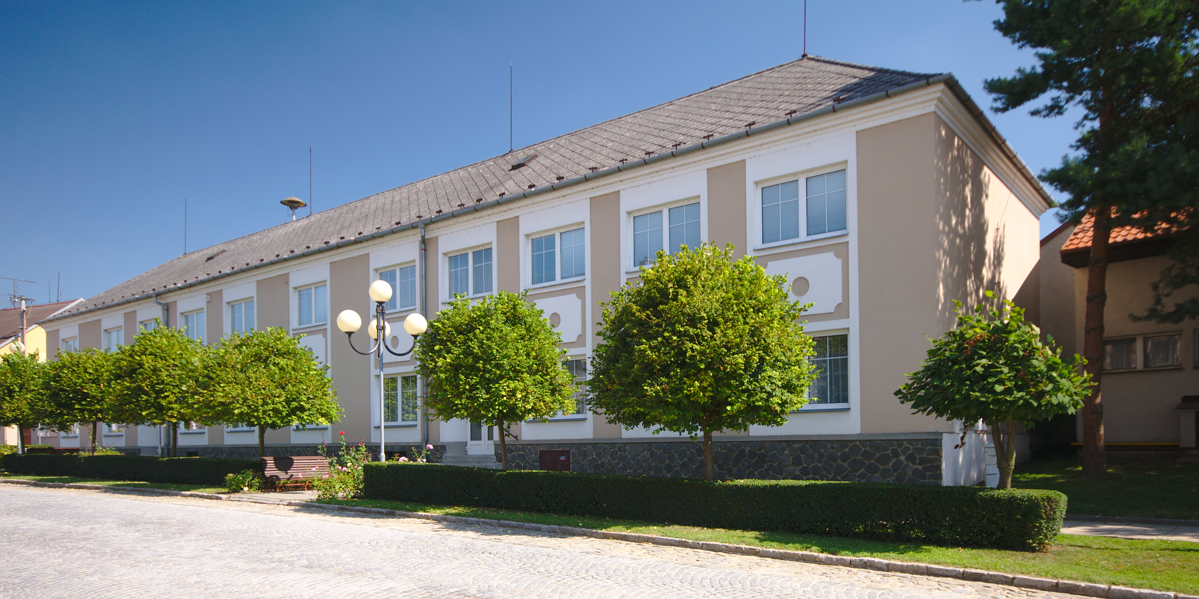 Obecní úřad, Pustiměřské Prusy, Pustiměř, okres Vyškov